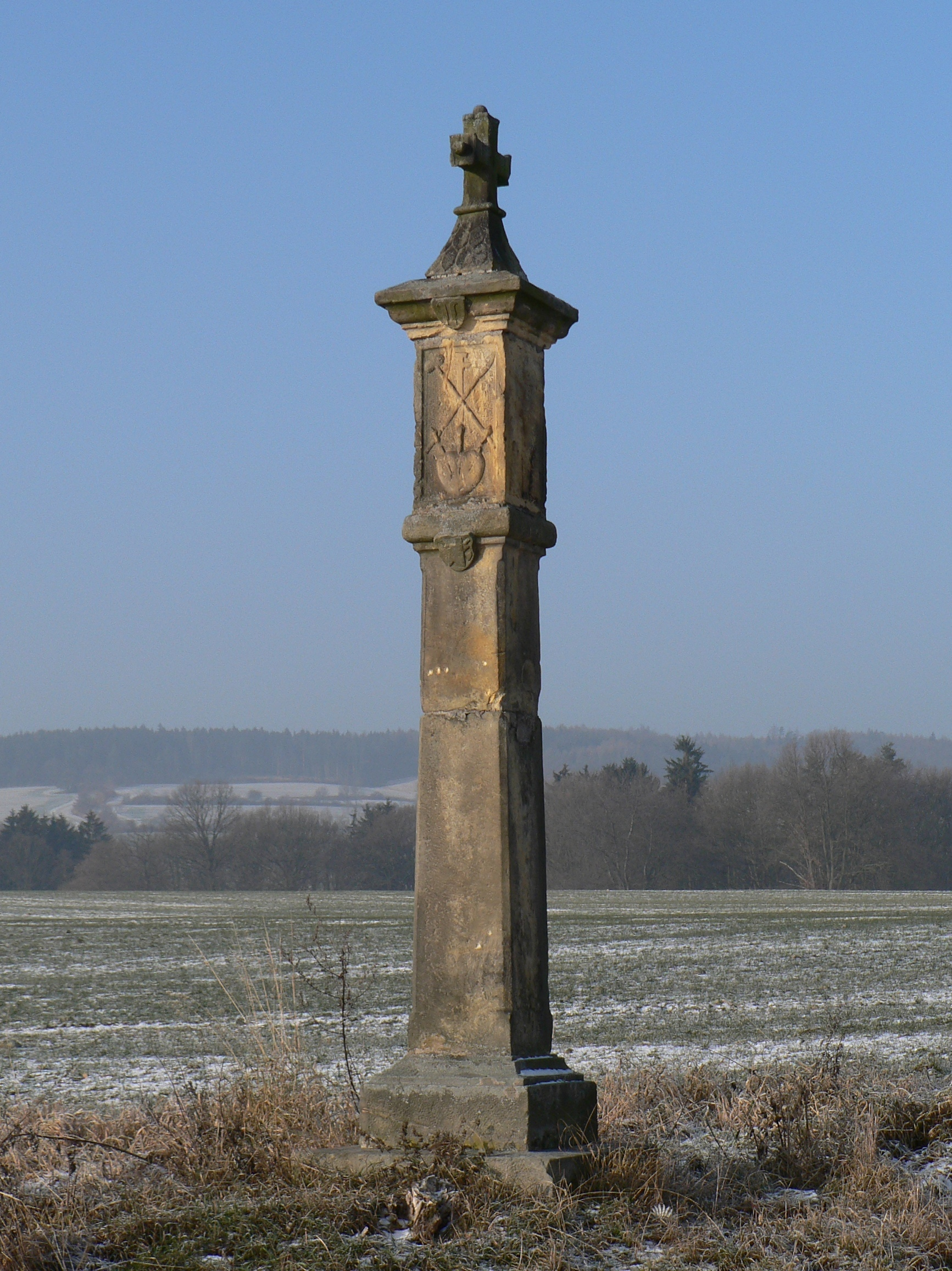 Renesanční boží muka z roku 1602 u silnice ke Slavoňovu (poblíž hřbitova).